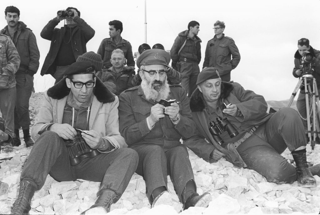 אריאל שרון, הרב שלמה גורן ורחבעם זאבי (גנדי) אומרים פרקי תהילים בשעות הראשונות של פעולת כראמה בירדן, 1968.